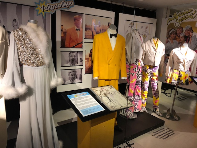 Villiä viihdettä ja kasarimeininkiä- näyttelyssä 2018 oli esillä Satu-Marja Nygrenin suunnittelemia asuja mm. Velipuolikuu- ja Mutapainin ystävät tv-sarjoista.